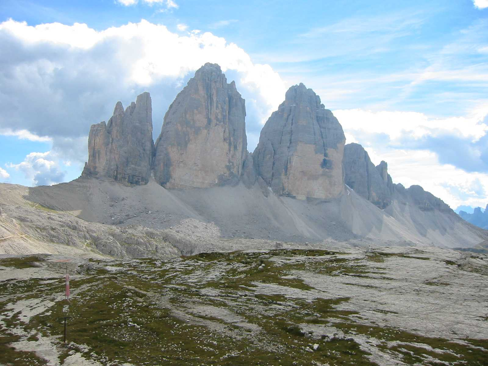 Drei Zinnen, fotografiert im September 2004 von Fantasy :-)